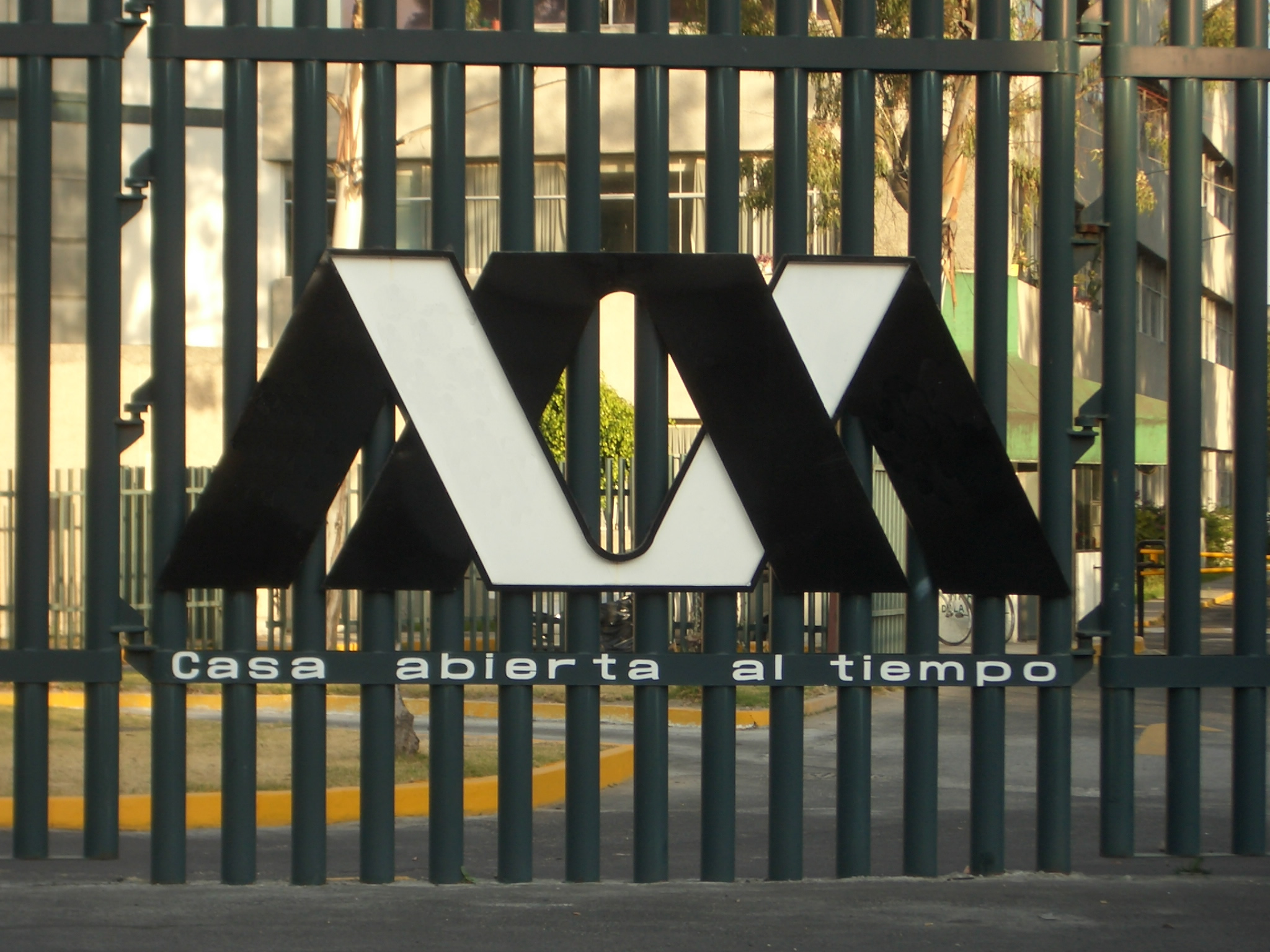 Reja Perimetral de la UAM Iztapalapa que contiene el logotipo de la UAM